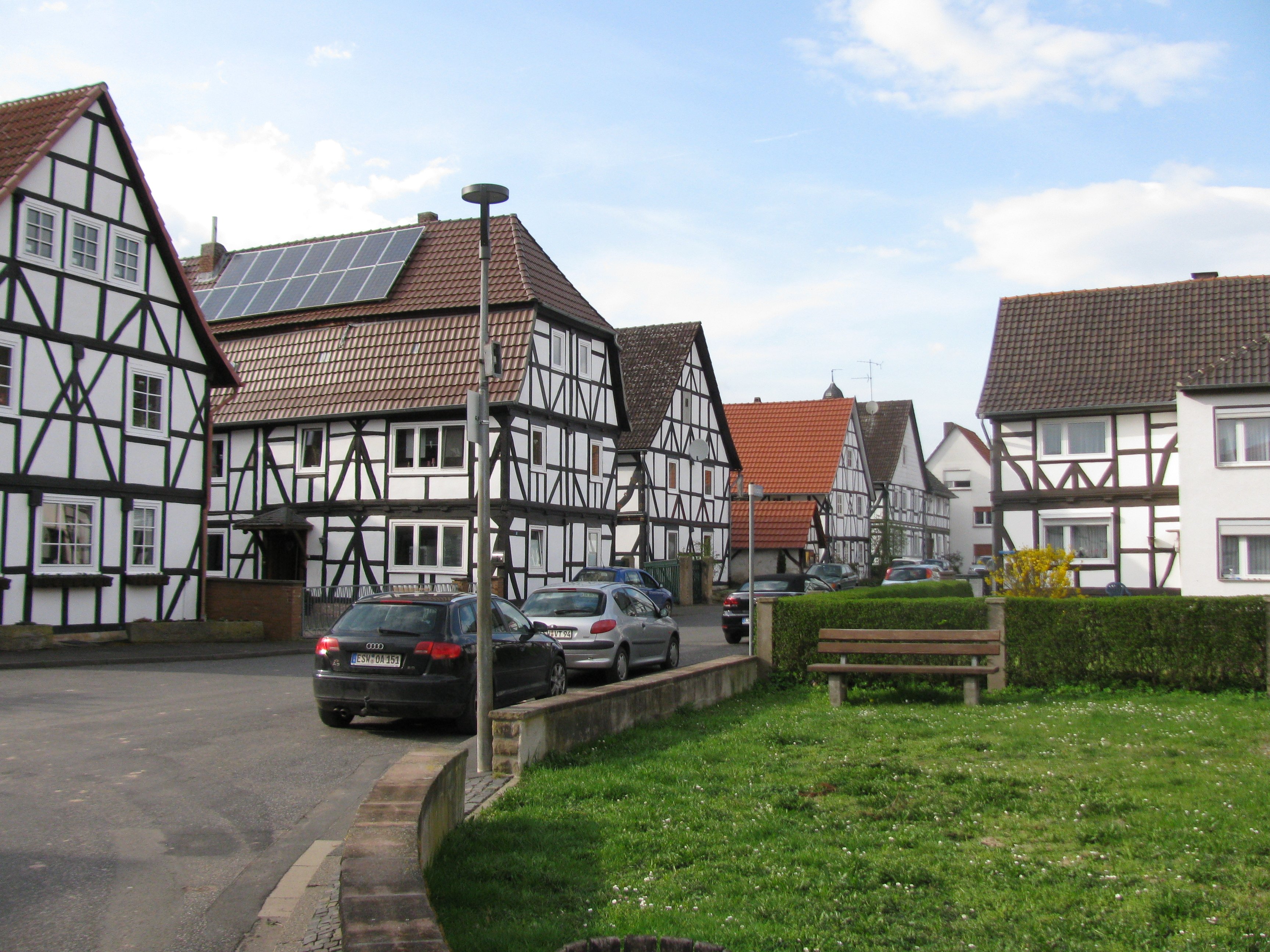 die Kirchstraße in Albungen